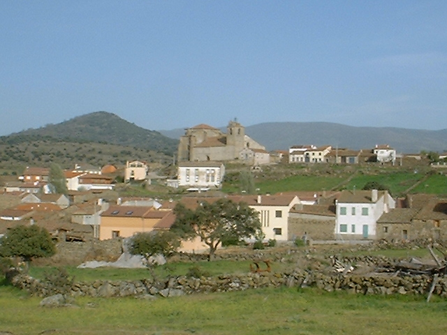 La Horcajada